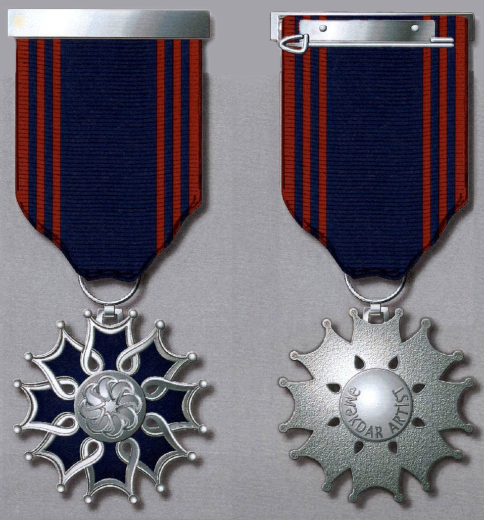 “Əməkdar artist” fəxri adının döş nişanı